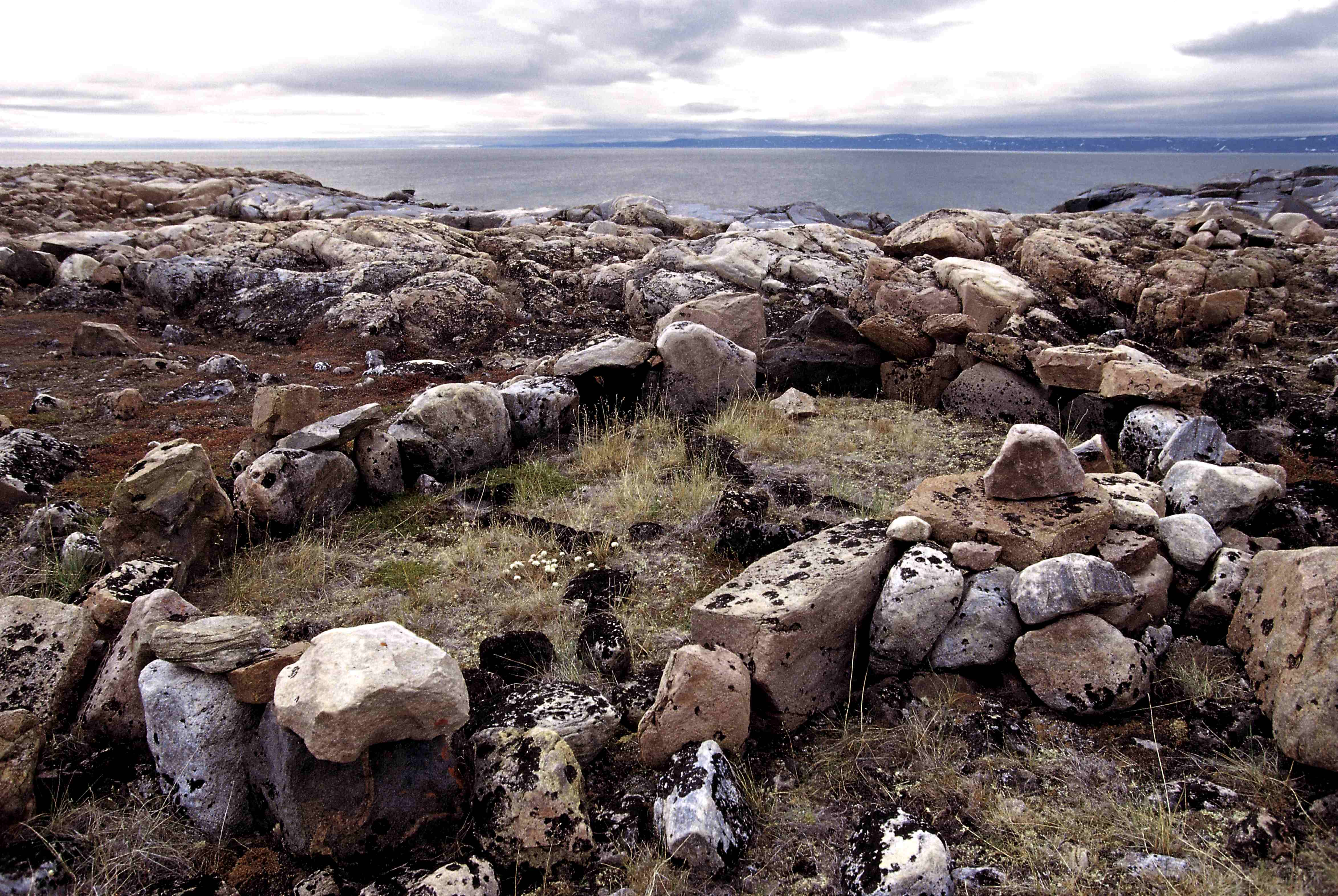 Relicts of Thule qarmaq (Ukkusiksalik NP)